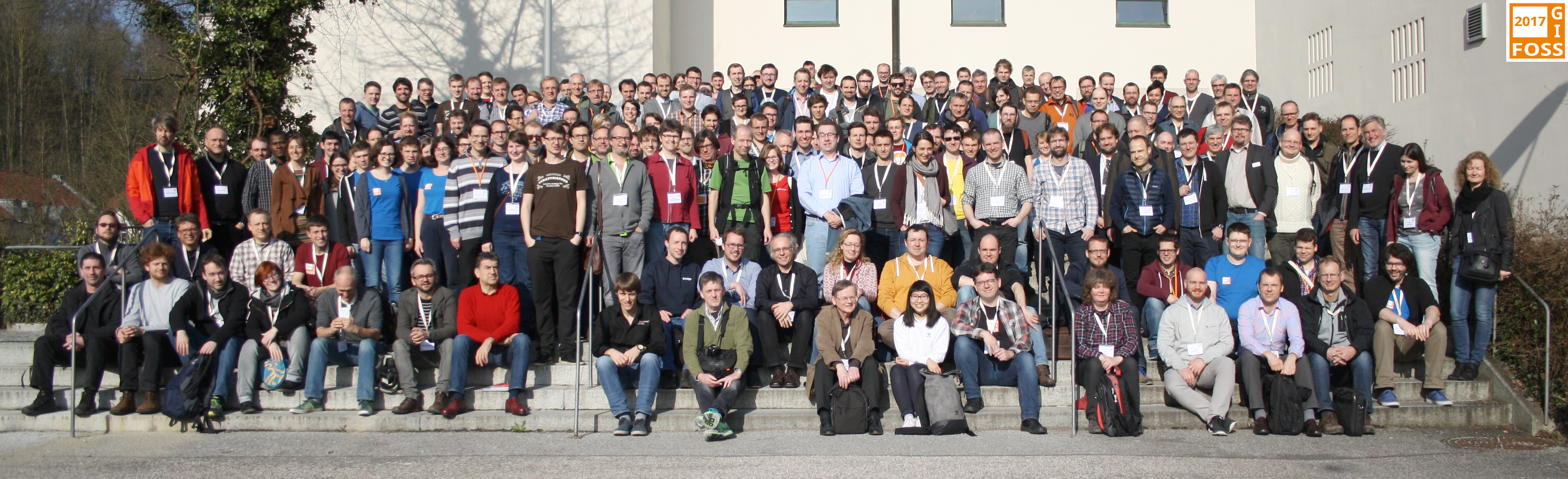 FOSSGIS 2017 Gruppenfoto mit FOSSGIS-Logo